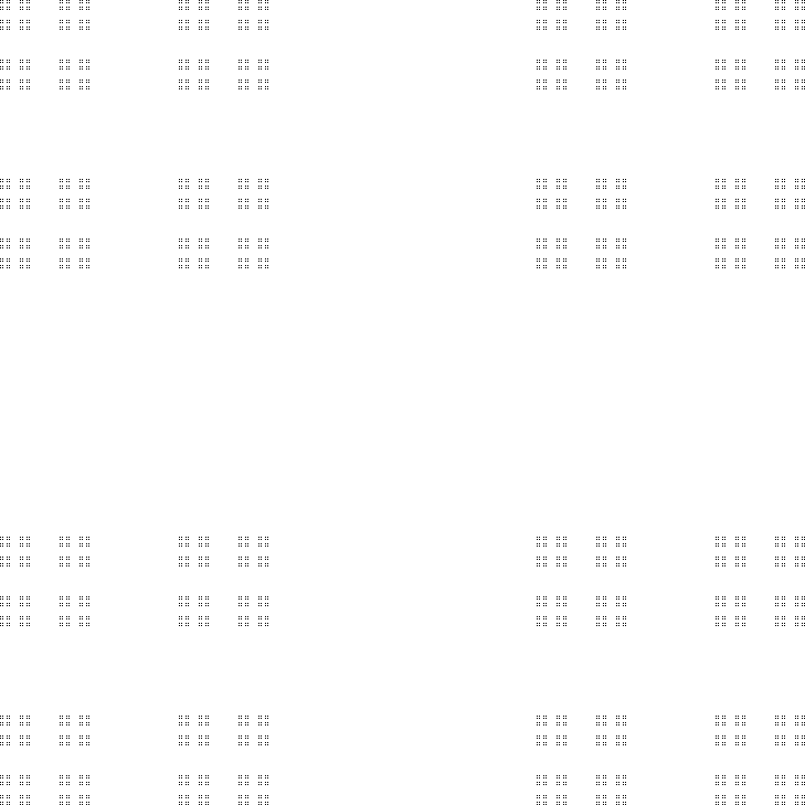 Cantordamm i 2 dimensioner, en fraktal. Kategori:Bilder av fraktaler